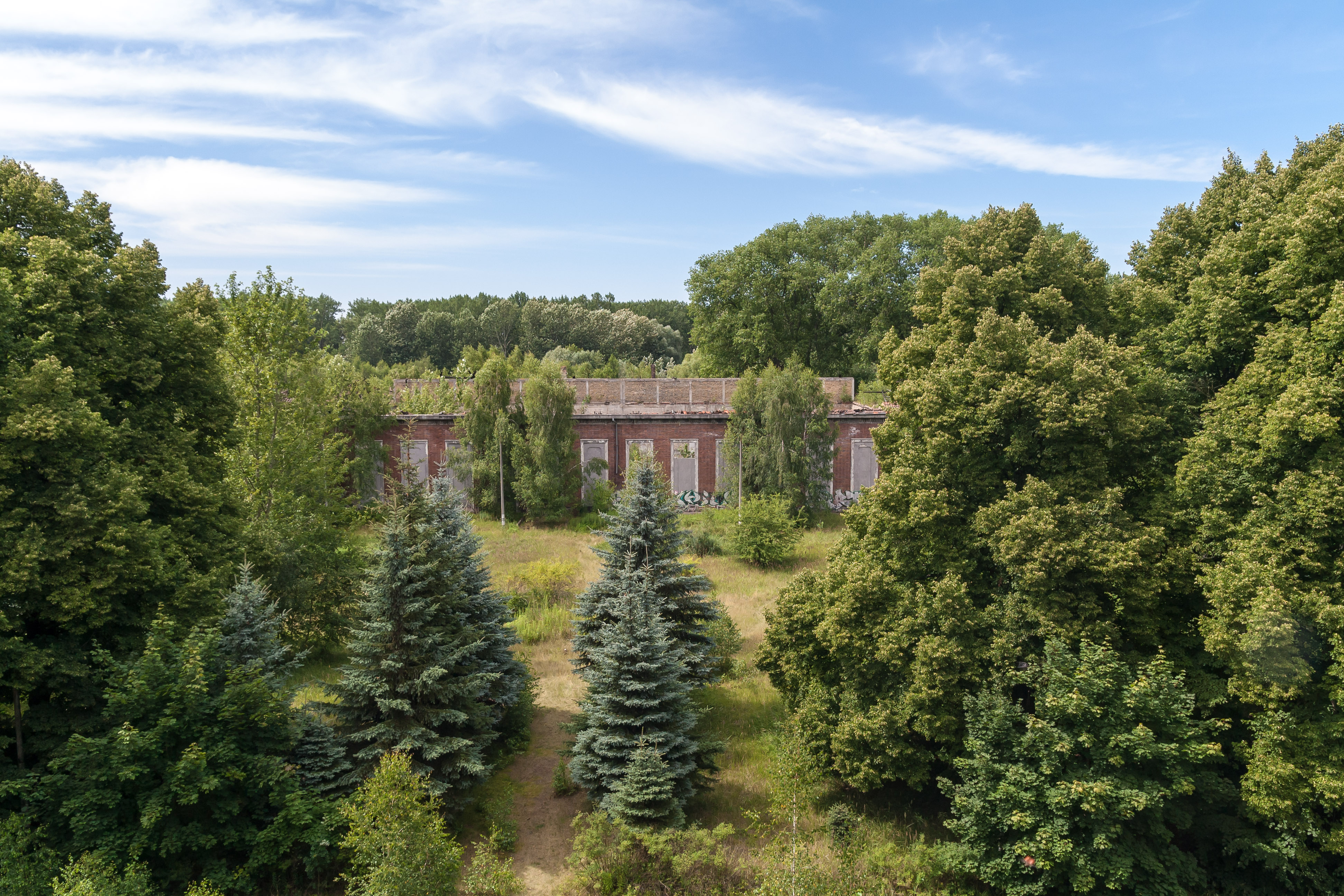 _MG_7686